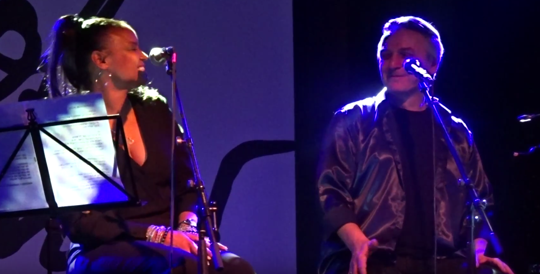 Der deutsche Sänger Peter Heppner und die US-amerikanische Sängerin Kim Sanders während Heppners "30 Years of Heppner Tour" im Gewerkschaftshaus Erfurt/Deutschland am 24. November 2017.